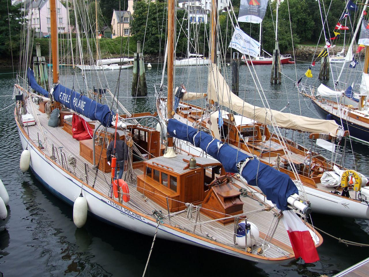 Le ketch français Etoile Polaire